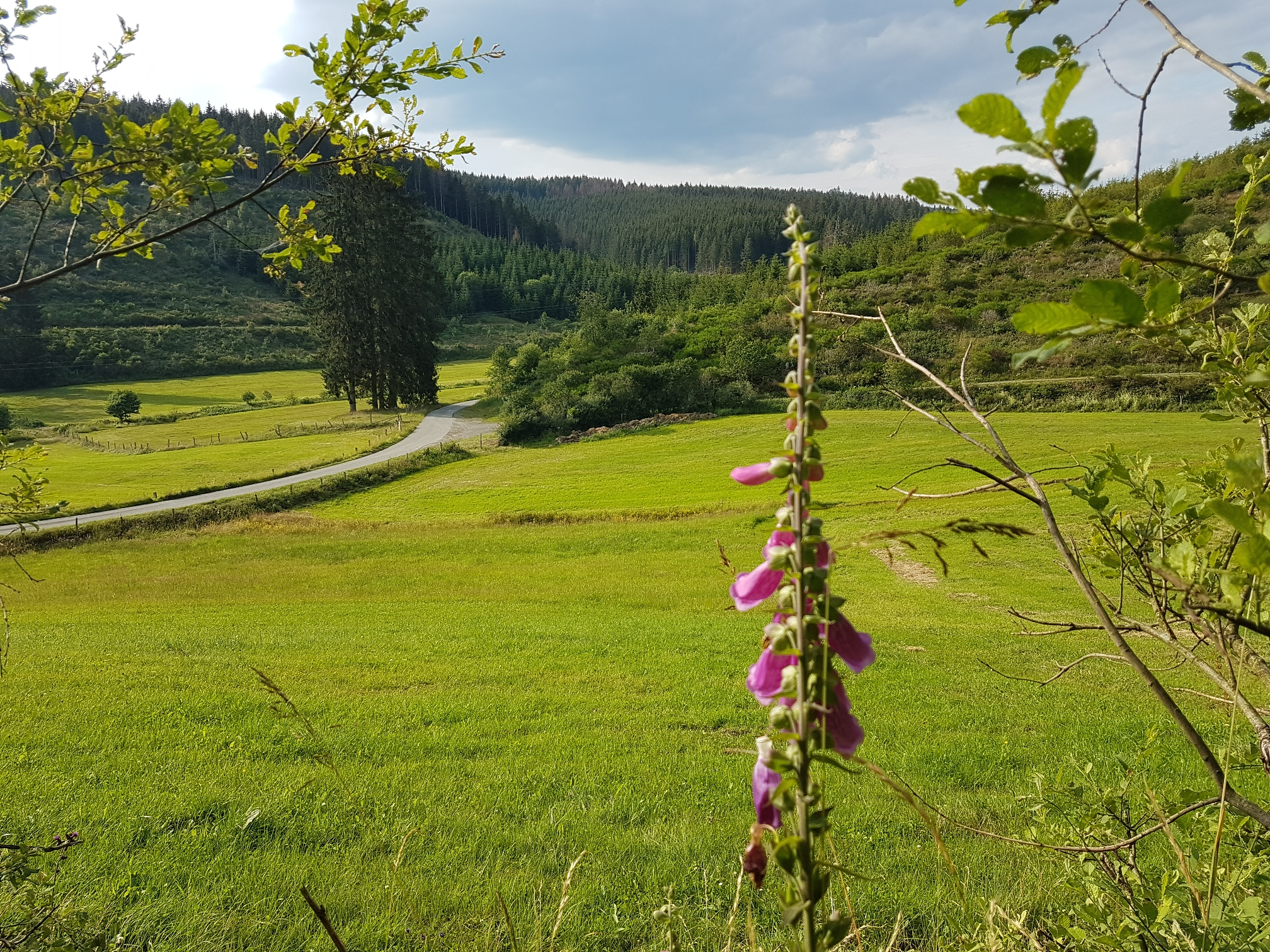 Weidelandschaft und Fichtenhochwald